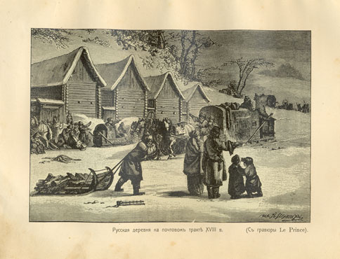 A russian village